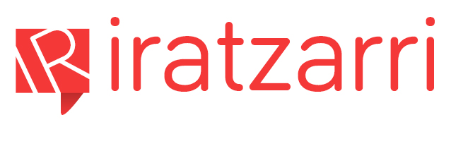 Iratzarri Logo